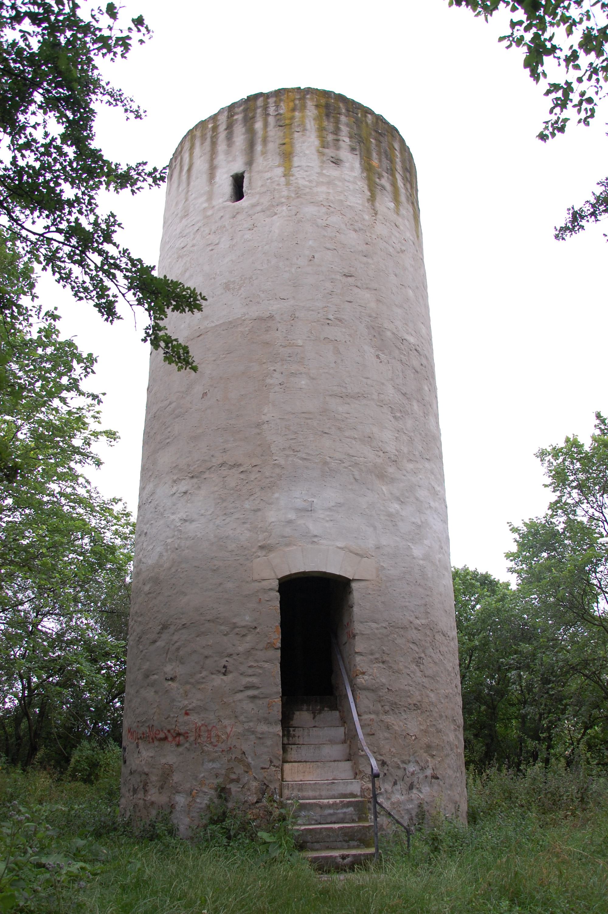 Bicklingswarte